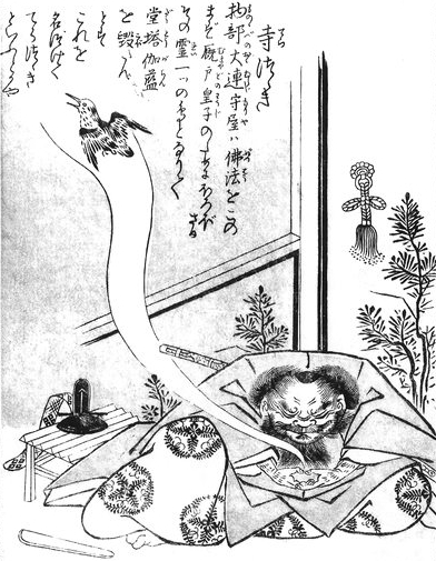 Teratsutsuki (寺つつき) from the Konjaku Gazu Zoku Hyakki (今昔画図続百鬼)